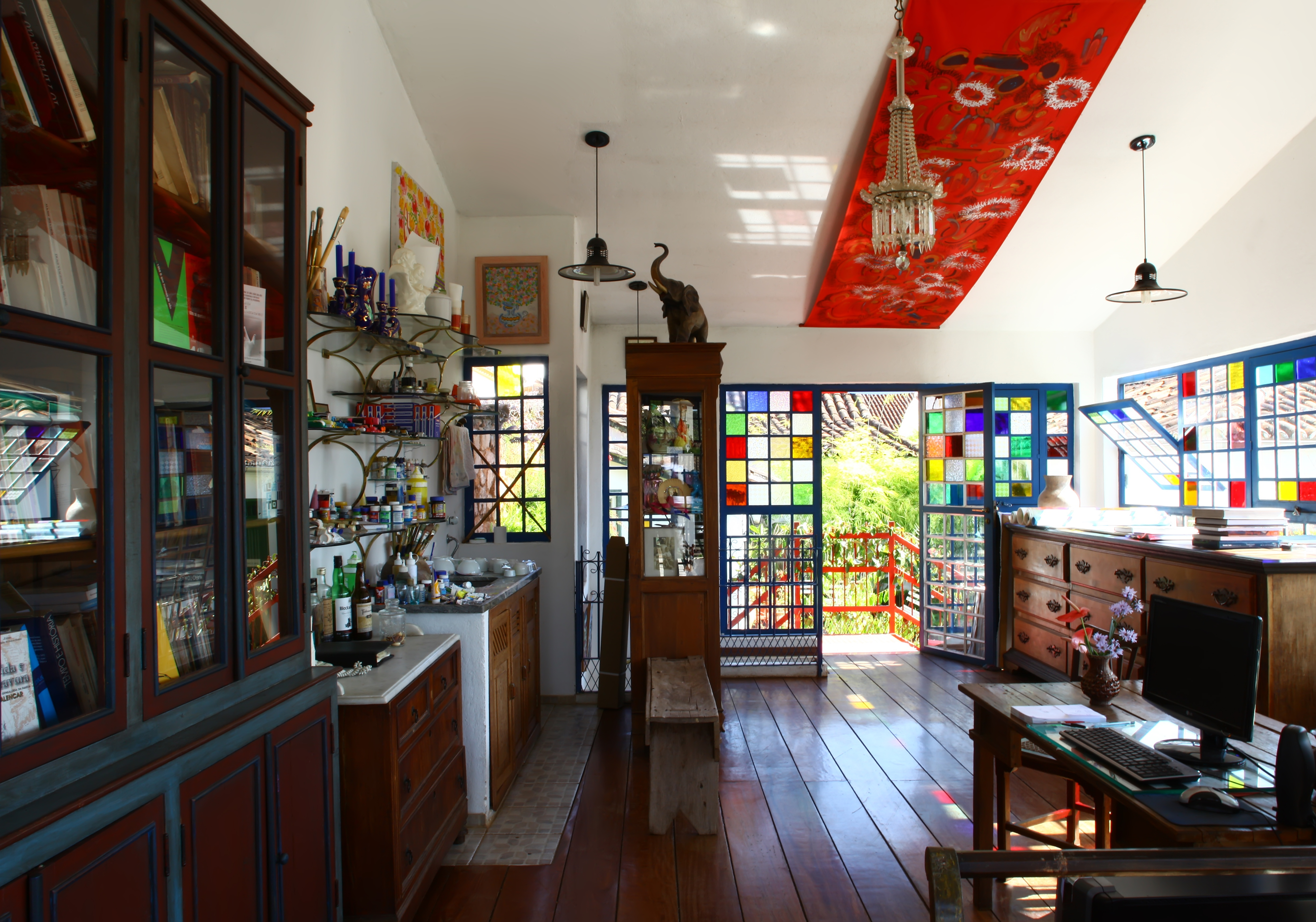 Português do Brasil: Foto do Estúdio de Oscar Araripe na cidade de Tiradentes